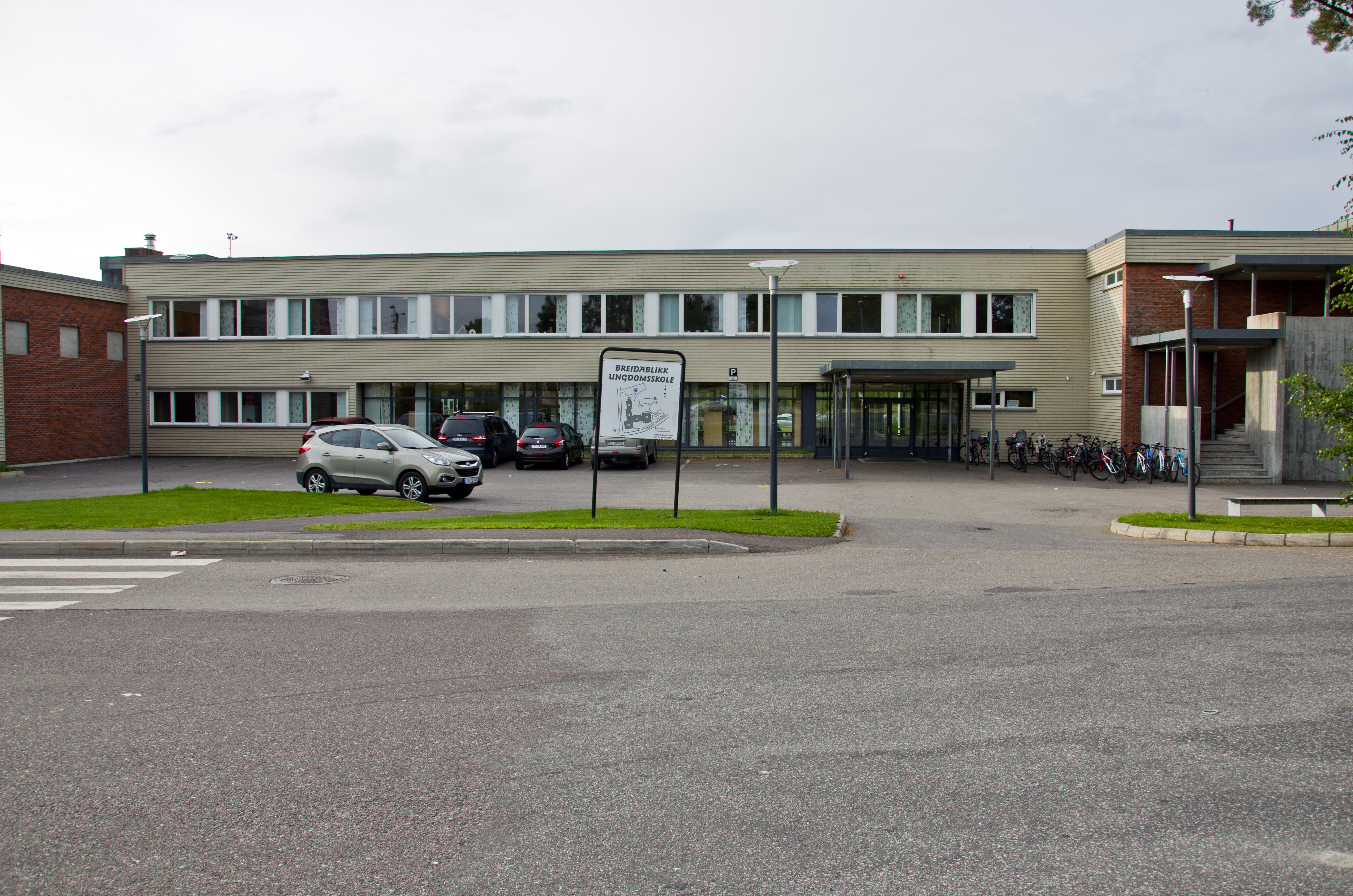 Breidablikk ungdomsskole i Sandefjord